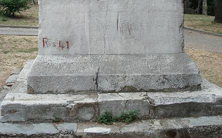 Aragonés: Calcil d'a Columna d'os Godos, en Istambul (Turquía).